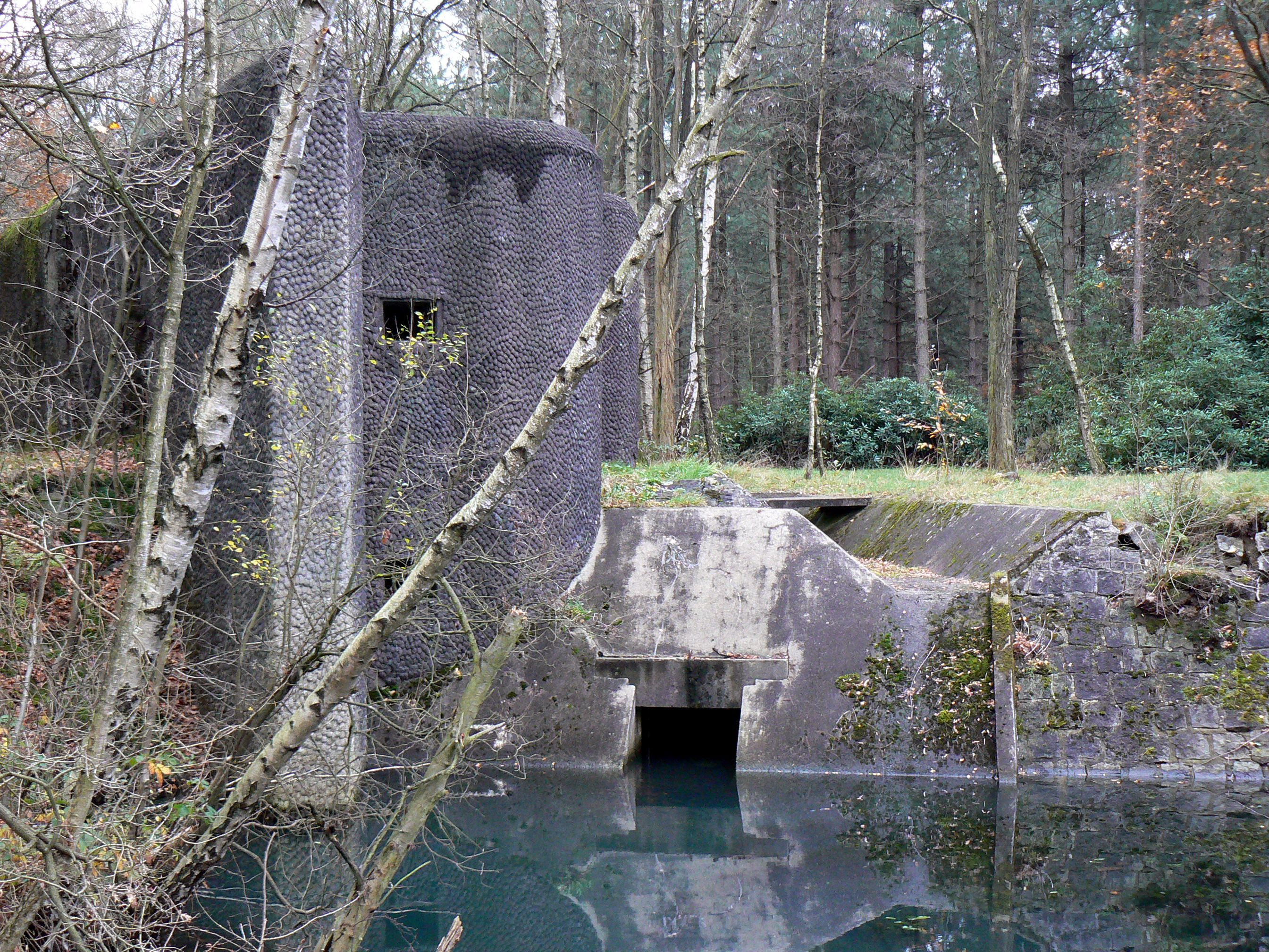 Sluisbunker, Antitankgracht, Kapellen (Belgium)